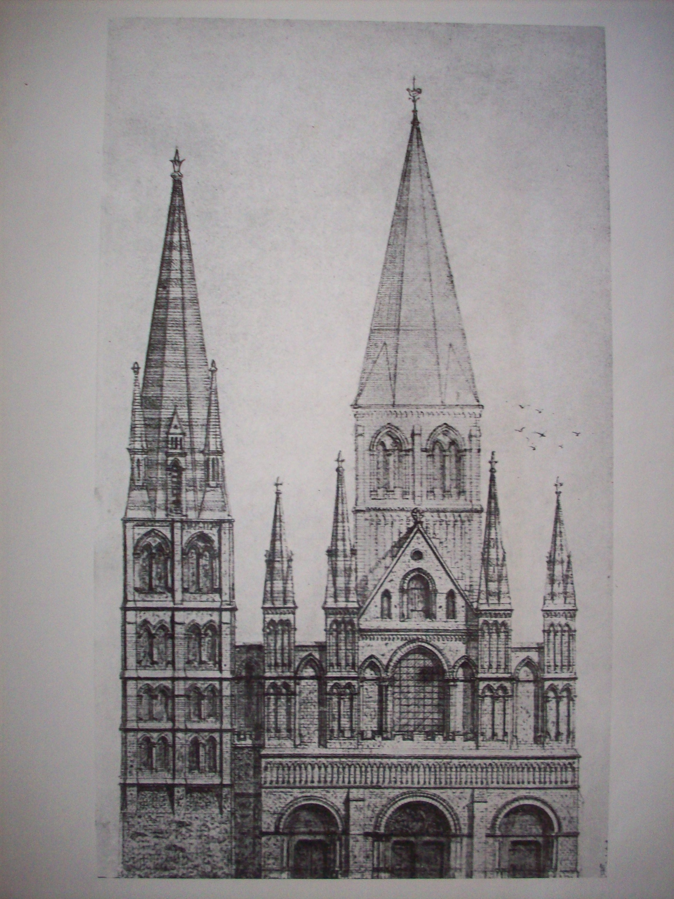 Façade de la cathédrale de Rouen au XIIe siècle, dessiné par Jean-Baptiste Foucher en 1906.